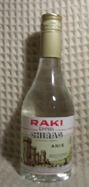 Bouteille de « Raki Chirac de réputation mondiale » Une marque de raki peu connue et élaborée en France.